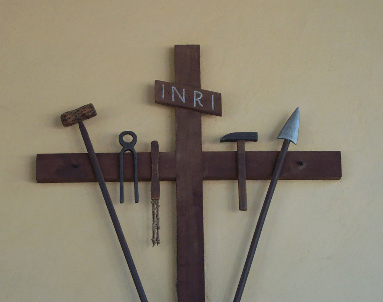 Croix accompagnée des instruments de la Passion (Poppiano frazione de Montespertoli en Toscane - Italie)